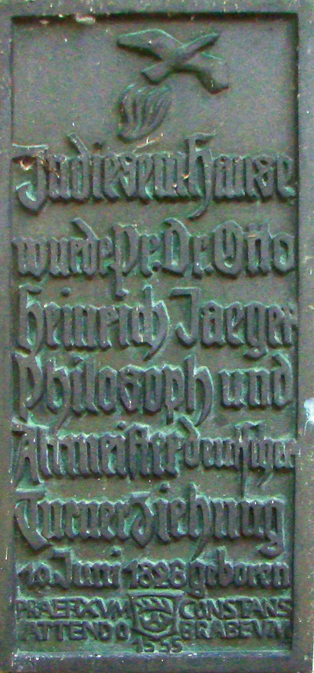 Gedenktafel am Geburtshaus von Otto Jäger in Bürg (Neuenstadt am Kocher)